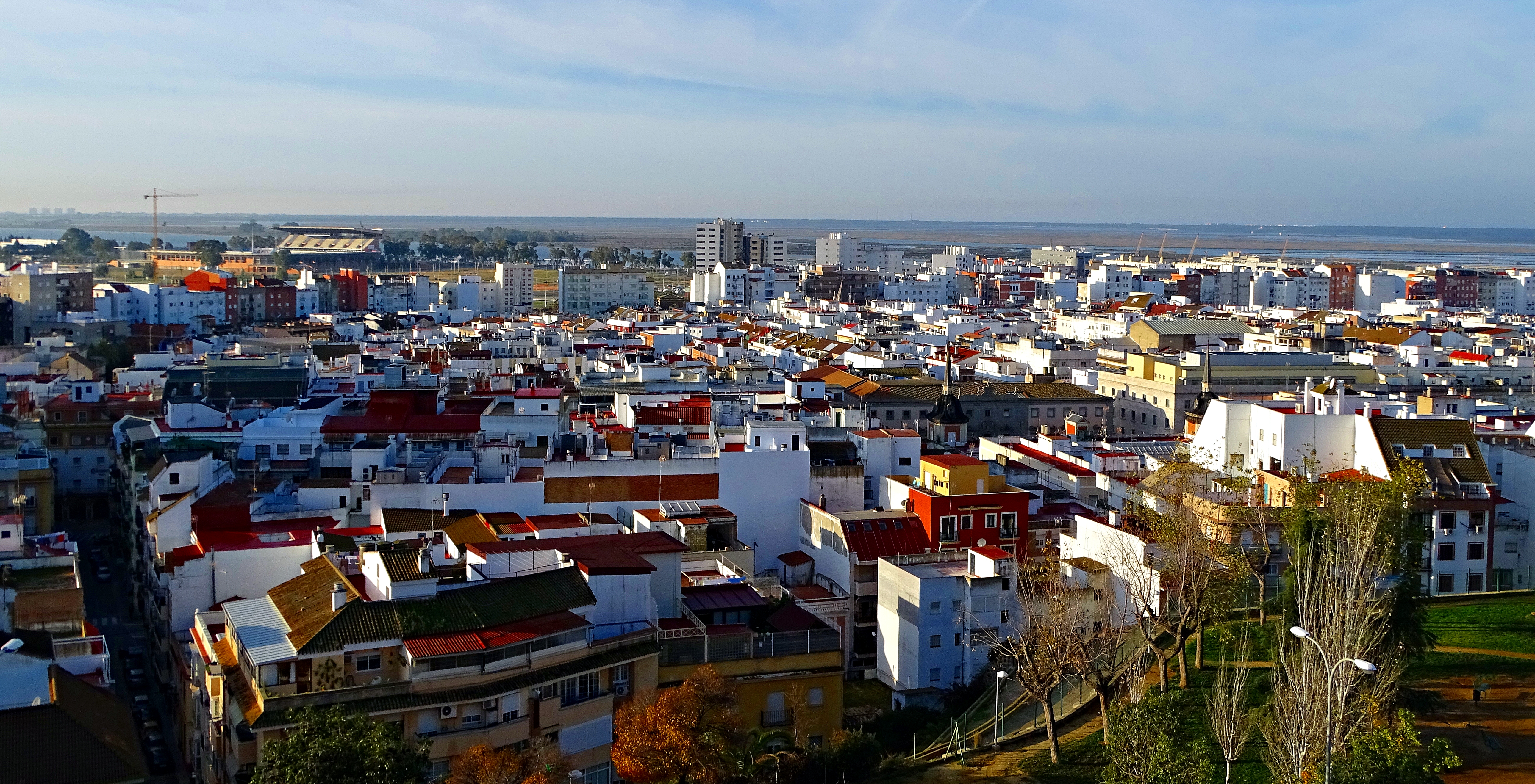 Huelva (Spain)